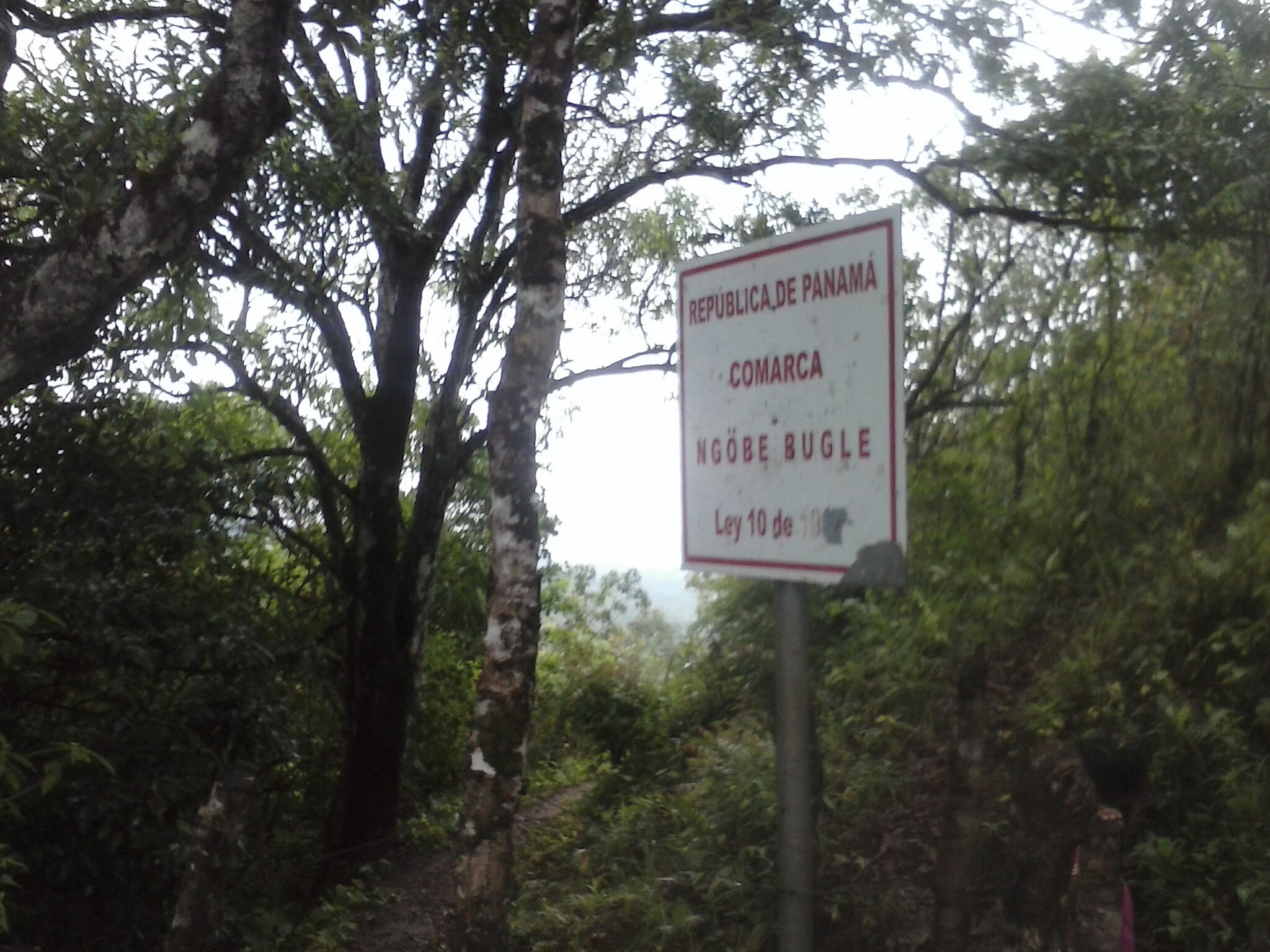 Es un "hito" ubicado en el corregimiento de El Prado, Distrito de Las Palmas. Corresponde a una de las Áreas anexas de la Comarca Ngäbe - Buglé